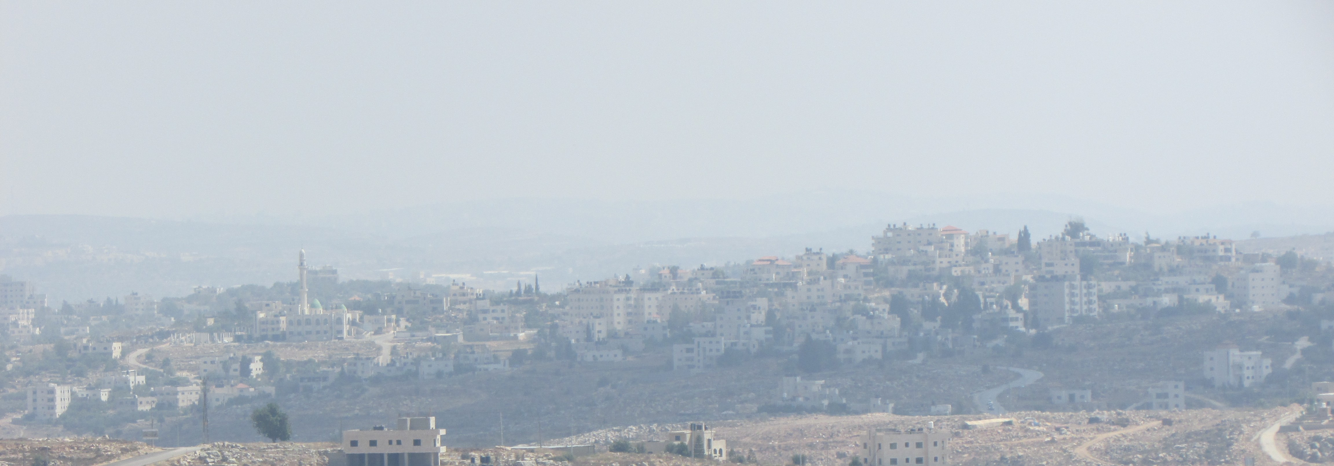 Abu Shukheidim from Ateret